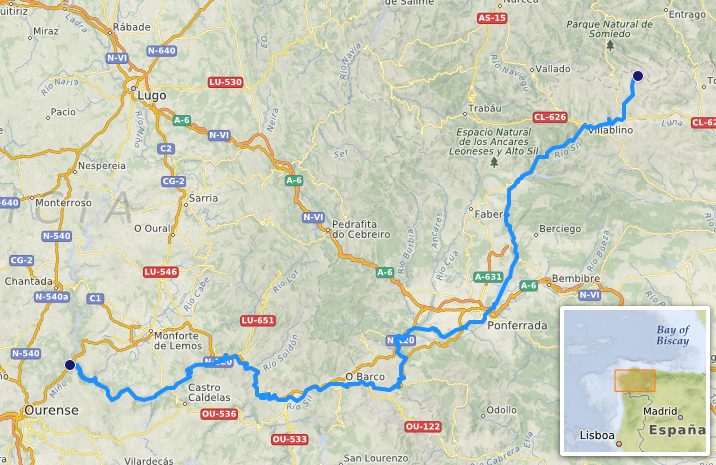 carte réalisée d'après umap.openstreetmap This map may be incomplete, and may contain errors. Don't rely solely on it for navigation.